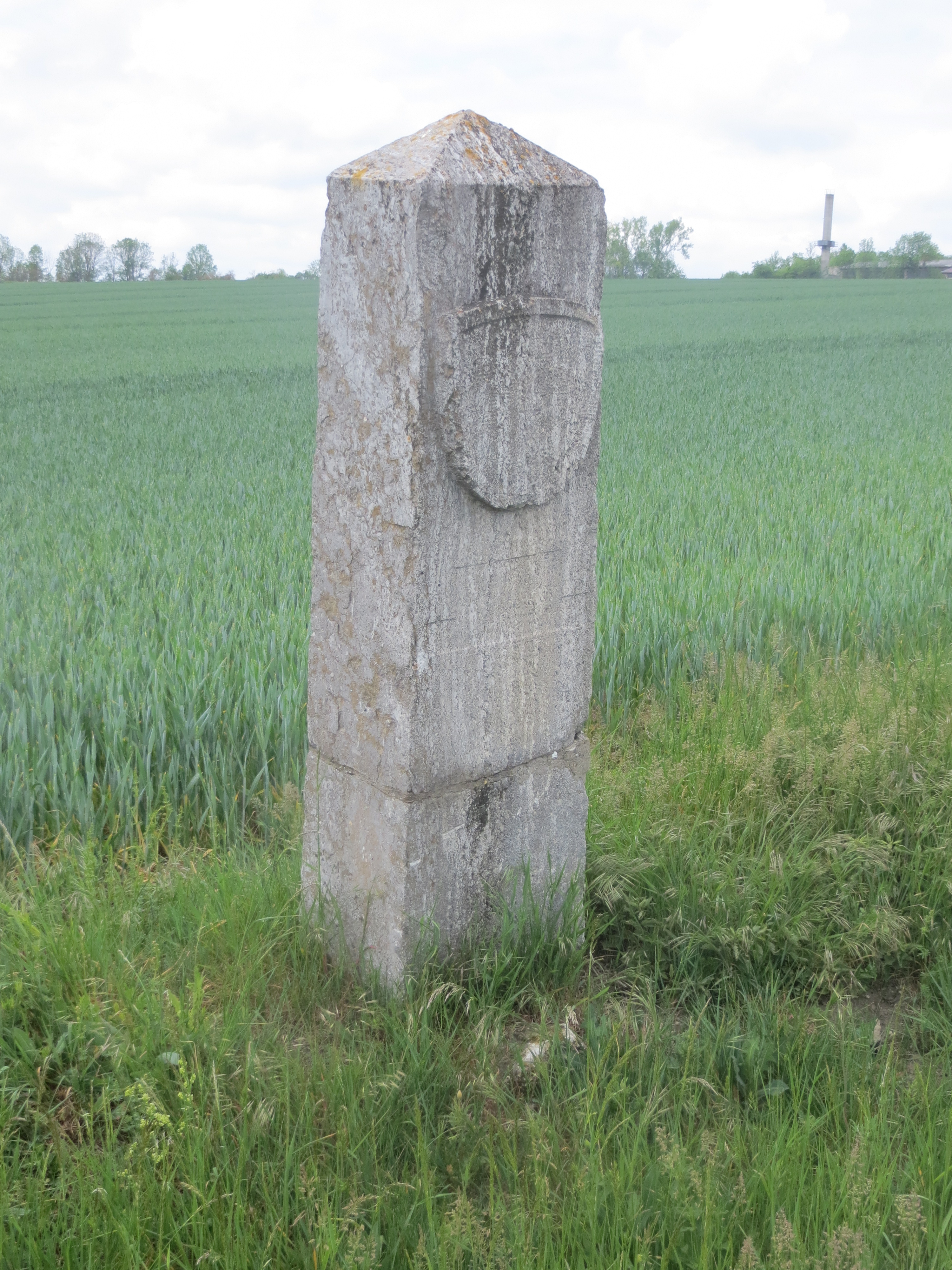 Hoheitsstein des Landes Thüringen an der Grenze zwischen dem Burgenlandkreis und dem Landkreis Weimarer Land an der B 87 30055